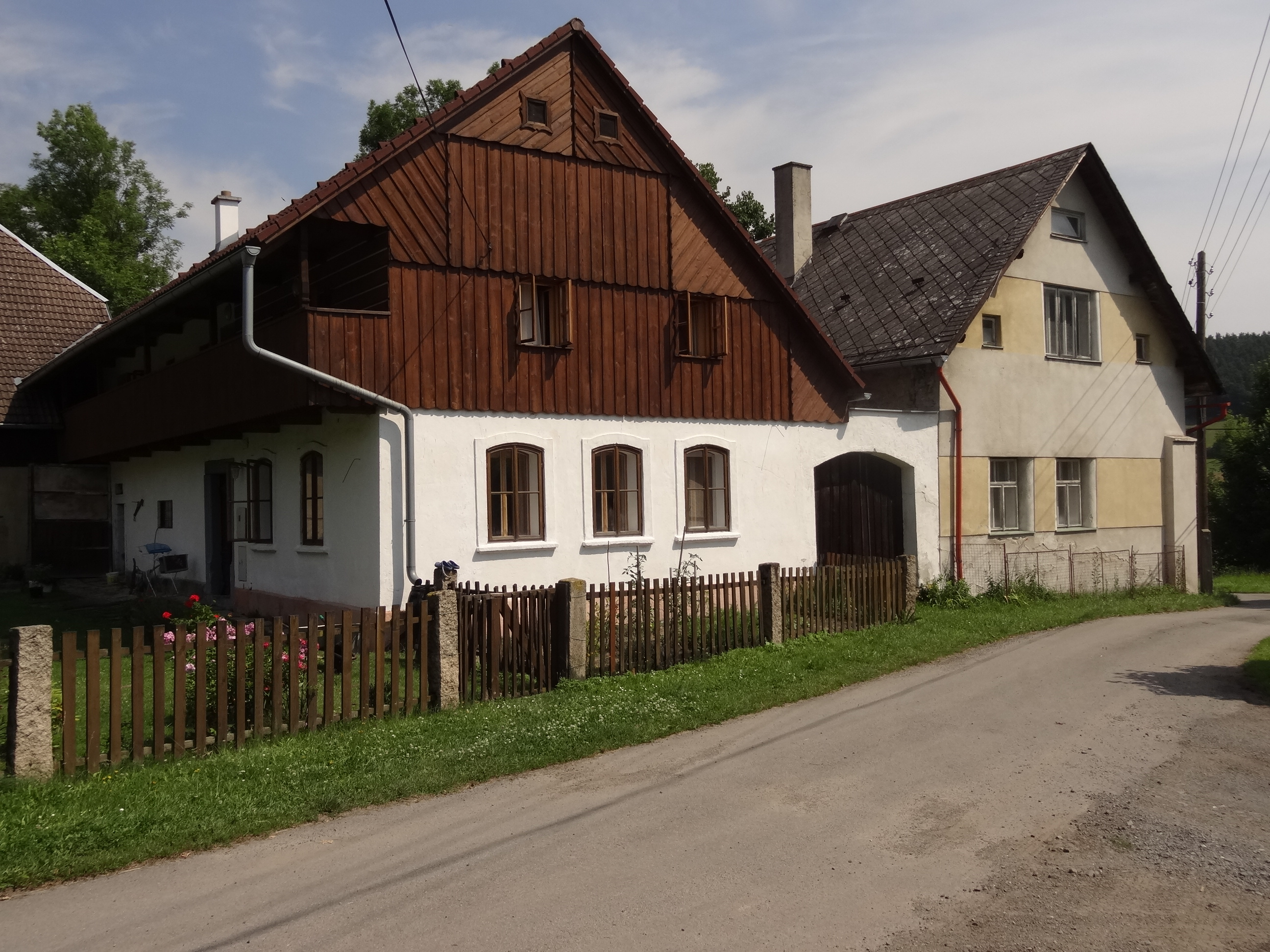 Vesec (v Podještědí, obec Bílá) - chalupy čp. 5 (vlevo) a 1 (vpravo)